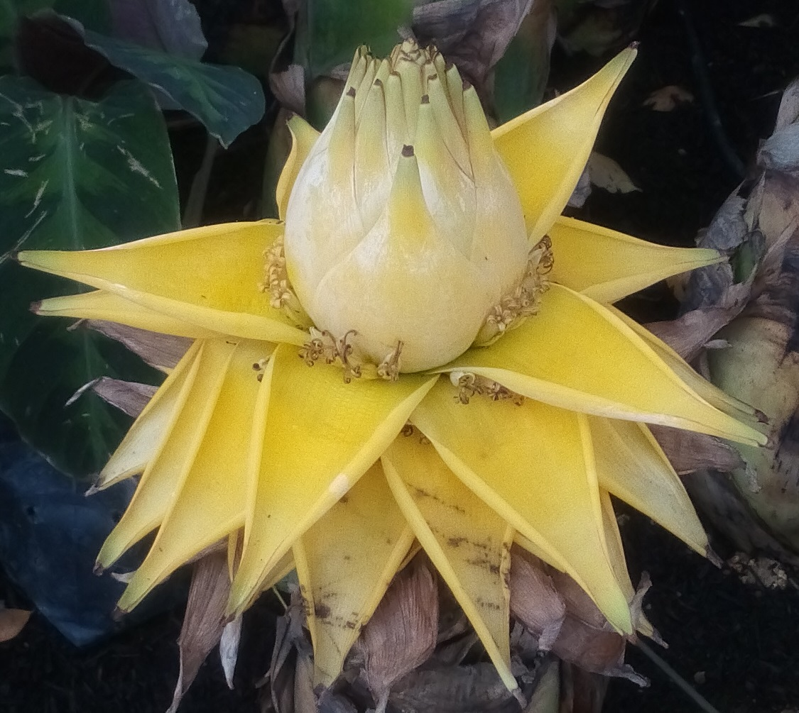 Chinese dwarf banana